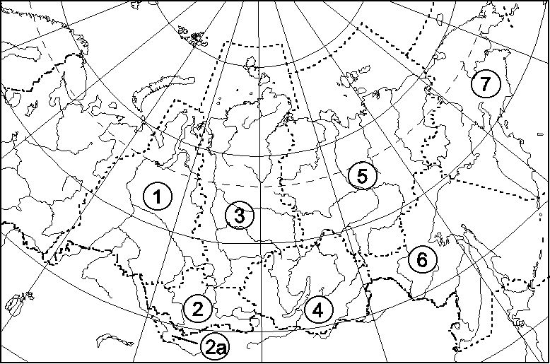 Гербарий Московского университета, районирование Сибири